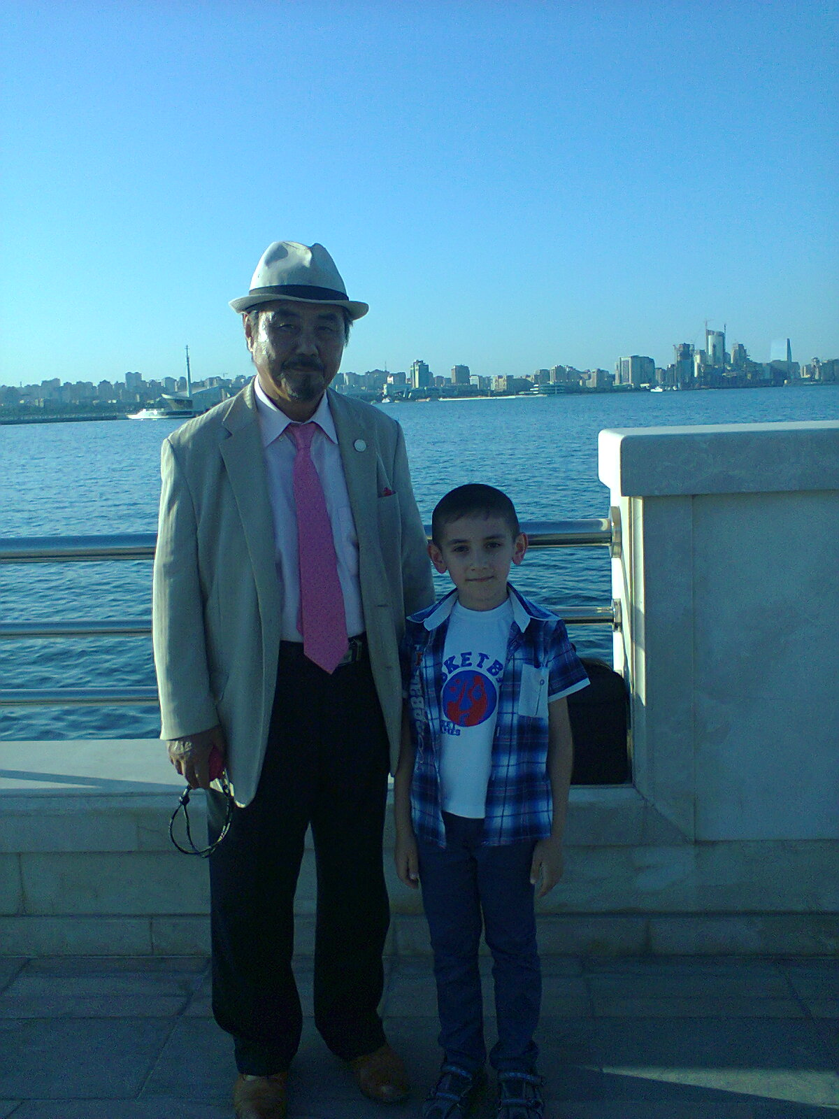 Masayuki Kukan Hisataka və Gəray Ramazan Bakı bulvarında